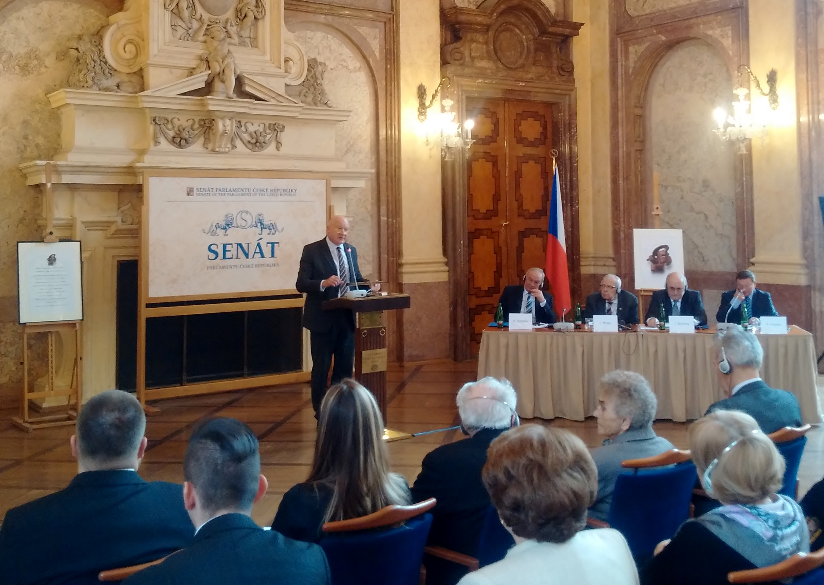 Ethan Gutmann při projevu v Senátu České republiky, 25. únor 2015 (Lukáš Kudláček)